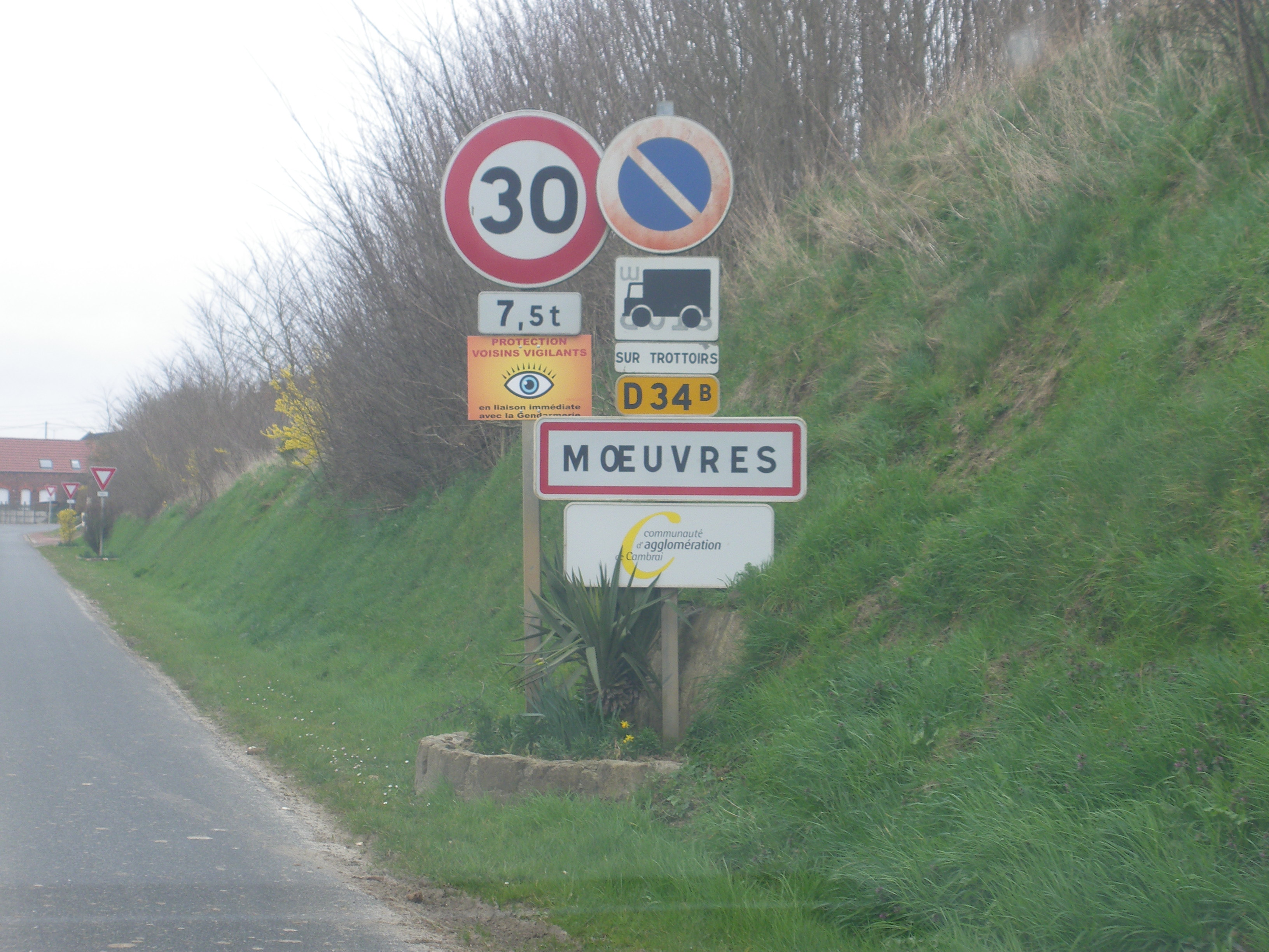 Vue d'une entrée de la commune de Mœuvres.